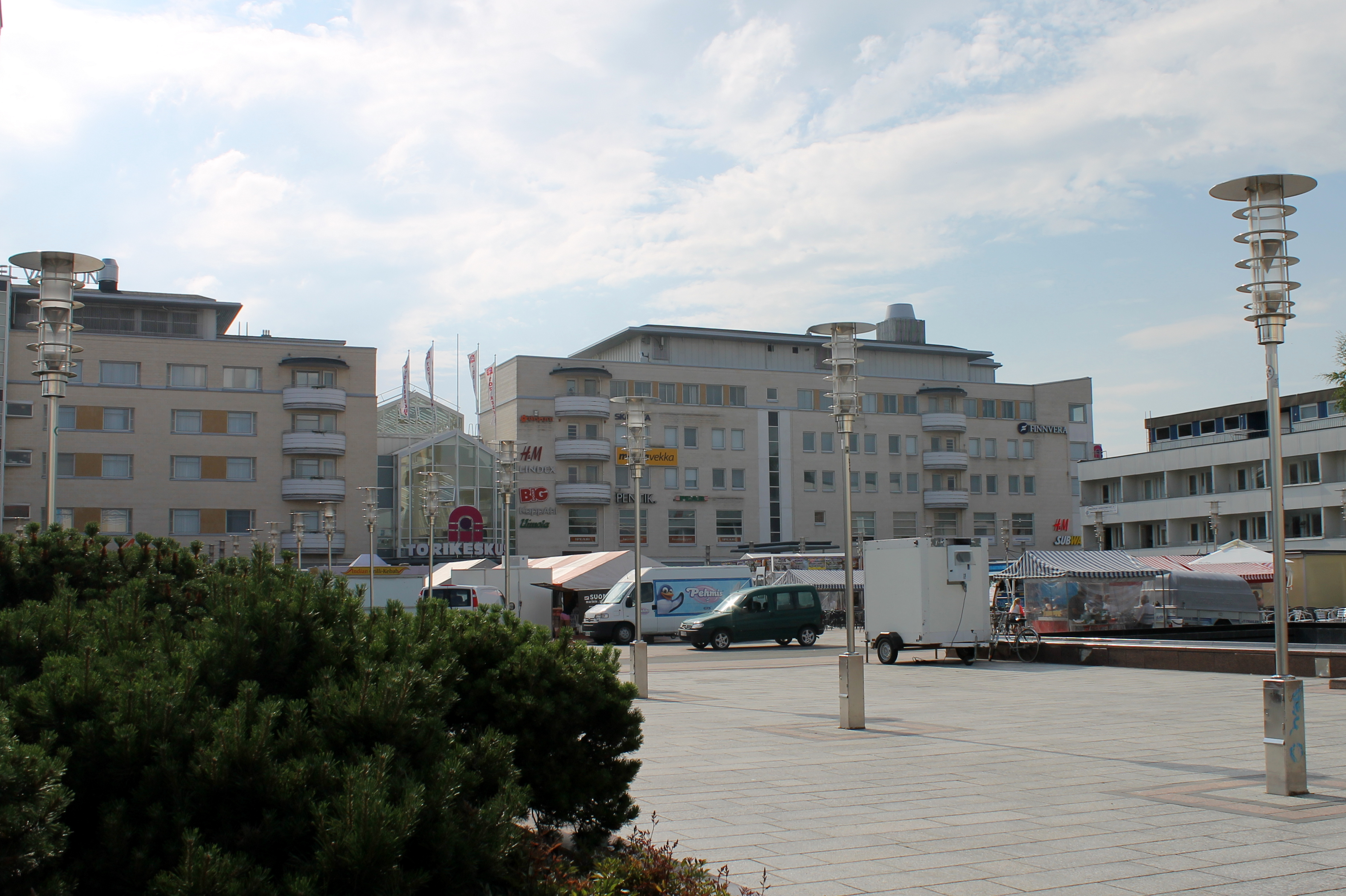 Torikeskus kesäkuussa 2013